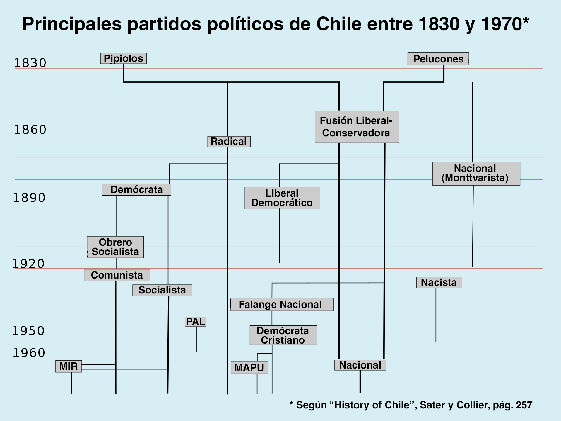 Principales partidos politicos chilenos entre 1830 y 1970